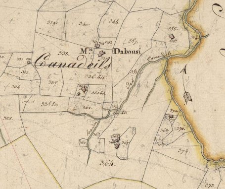 Canadells en el Cadastre napoleònic del 1812 (Arxius Departamentals dels Pirineus Orientals)